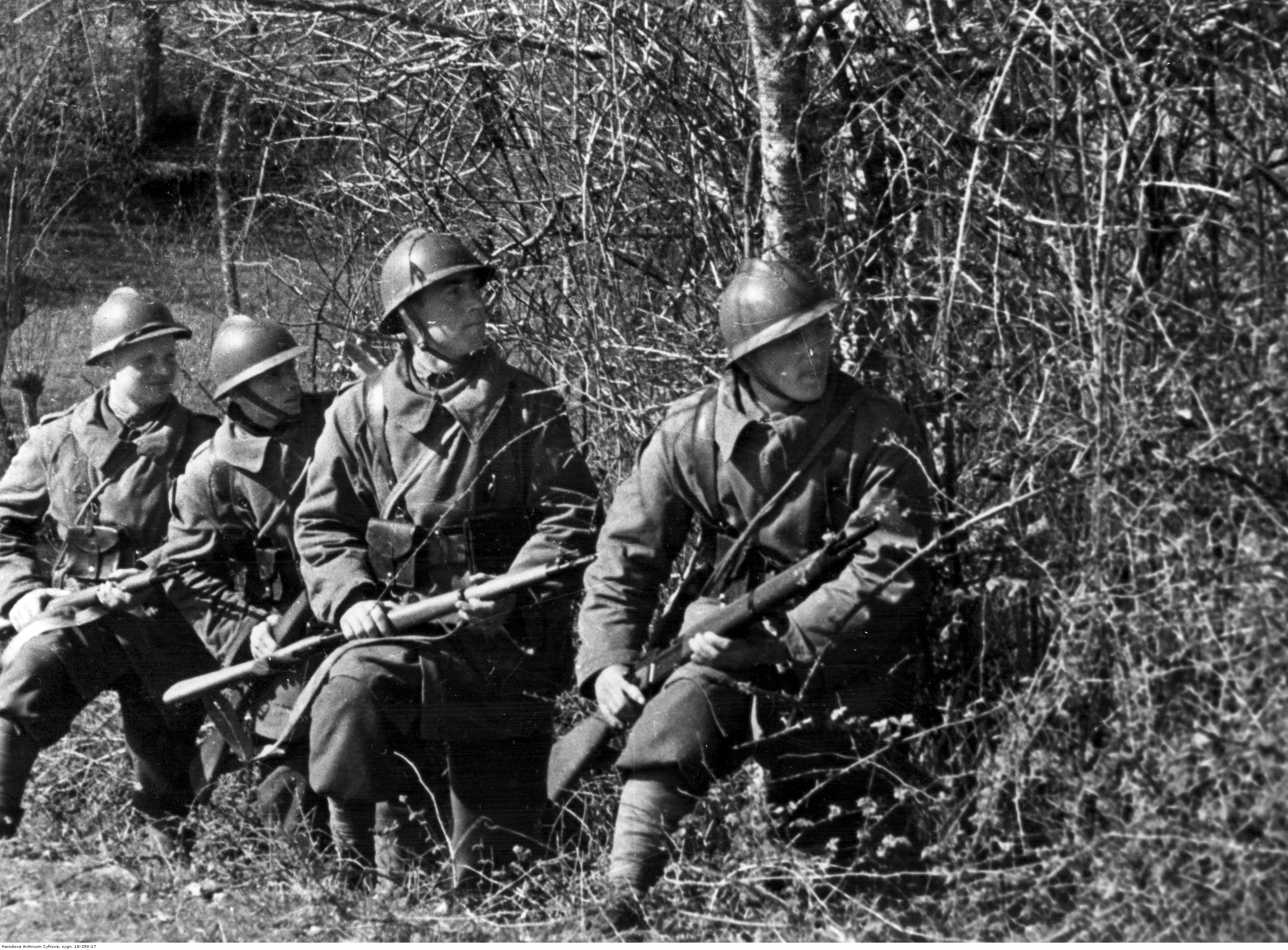 Ćwiczenia piechoty polskiej we Francji - widoczni żołnierze z karabinami MAS 36. Archiwum Fotograficzne Czesława Datki. Sygnatura: 18-250-17